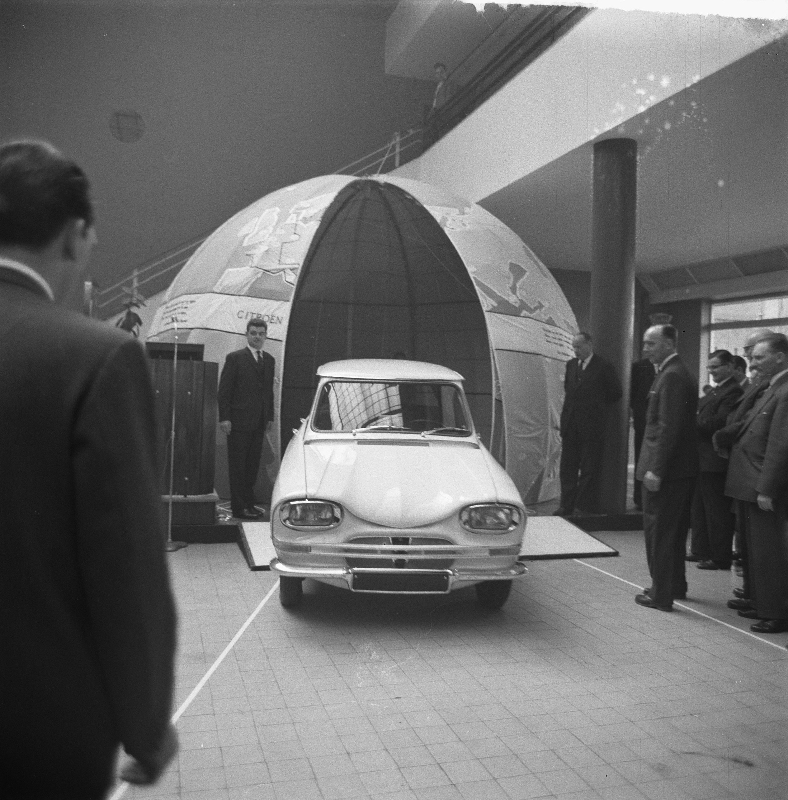 Collectie / Archief : Fotocollectie Anefo Reportage / Serie : [ onbekend ] Beschrijving : Opdracht Citroen Amsterdam Datum : 24 april 1961 Locatie : Amsterdam, Noord-Holland Trefwoorden : opdrachten Persoonsnaam : CITROEN Fotograaf : Nijs, Jac. de / Anefo Auteursrechthebbende : Nationaal Archief Materiaalsoort : Negatief (zwart/wit) Nummer archiefinventaris : bekijk toegang 2.24.01.04 Bestanddeelnummer : 912-3785